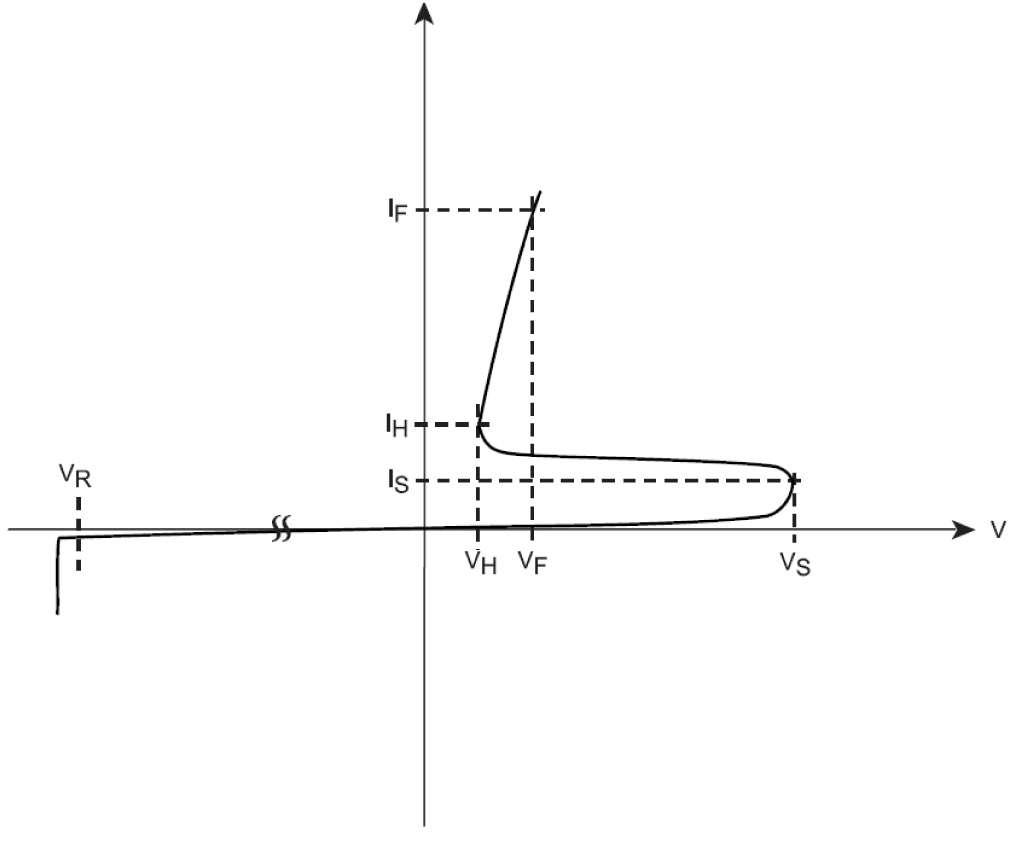 Curva de comportamiento de la corriente en términos del voltaje. Cuando él SUS alcanza el voltaje de conducción, este desciende y depende de la corriente que fluya en el dispositivo. Si se invierte el voltaje en terminales y se supera VR el dispositivo se daña.